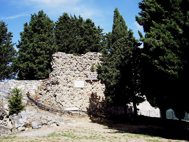 Rocca aldobrandesca di Semproniano (GR), foto 18/08/2006